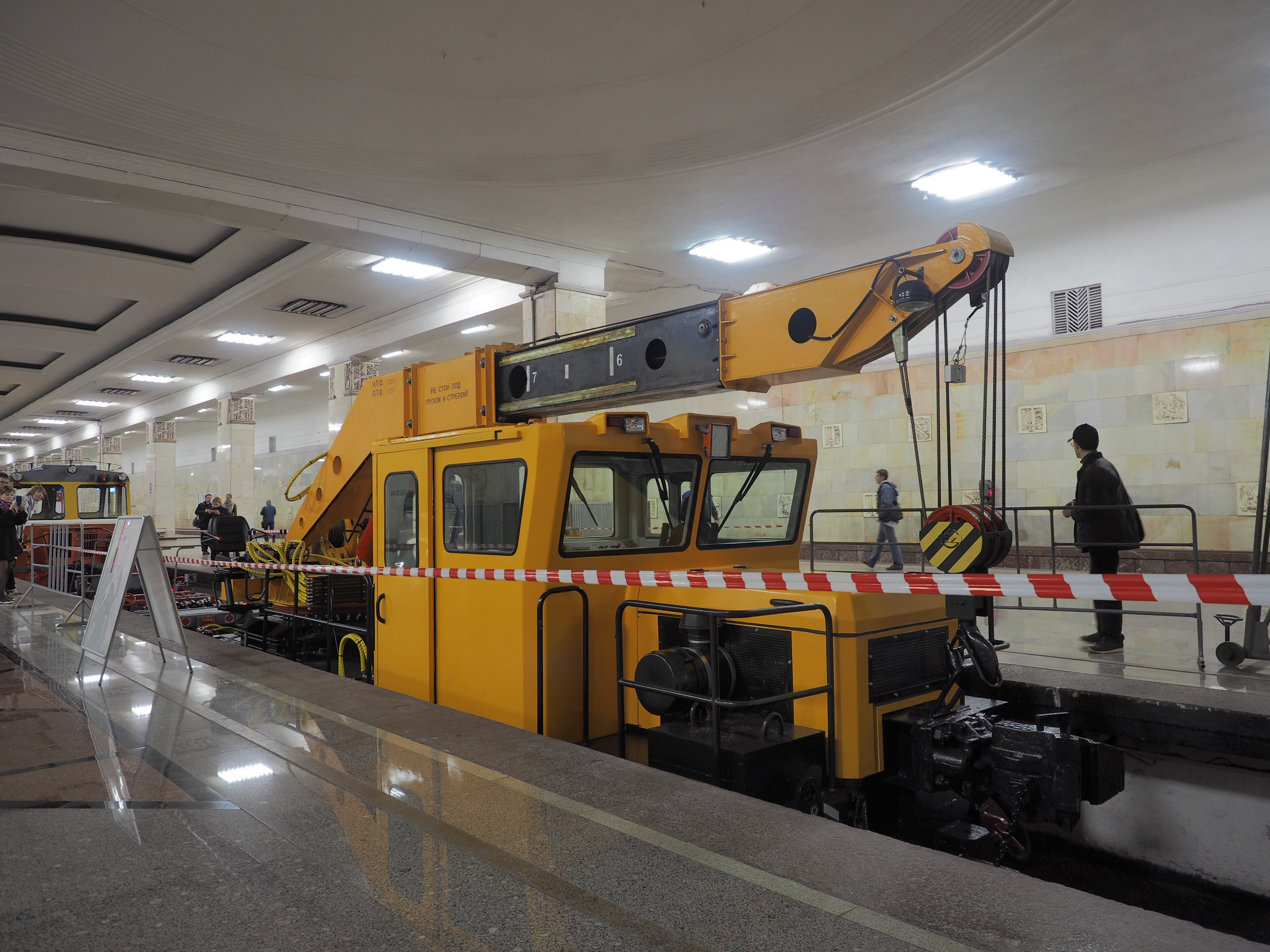 Кран КМП-65М №4 выпуска 2014 года Moscow metro railway crane KMP-65M On May 15 and 16, 2015, Moscow Metro celebrated its 80th anniversary. For the first time, service cars were exhibited at the siding track of Partizanskaya station. Earlier, historical cars were exhibited there. 15 и 16 мая 2015 в Москве отмечалось 80 лет Московскому метро. Впервые была устроена выставка служебных вагонов. Они были расставлены на 3 пути станции Партизанская. Перед этим также проводилась выставка музейных вагонов